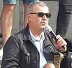 J-P Bacquet au tournoi de football T.Bourret à Coudes